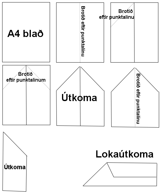 Mynd af skutlugerð. Gert eftir myndinni á is::en:Image:Paper plane diagram.png.